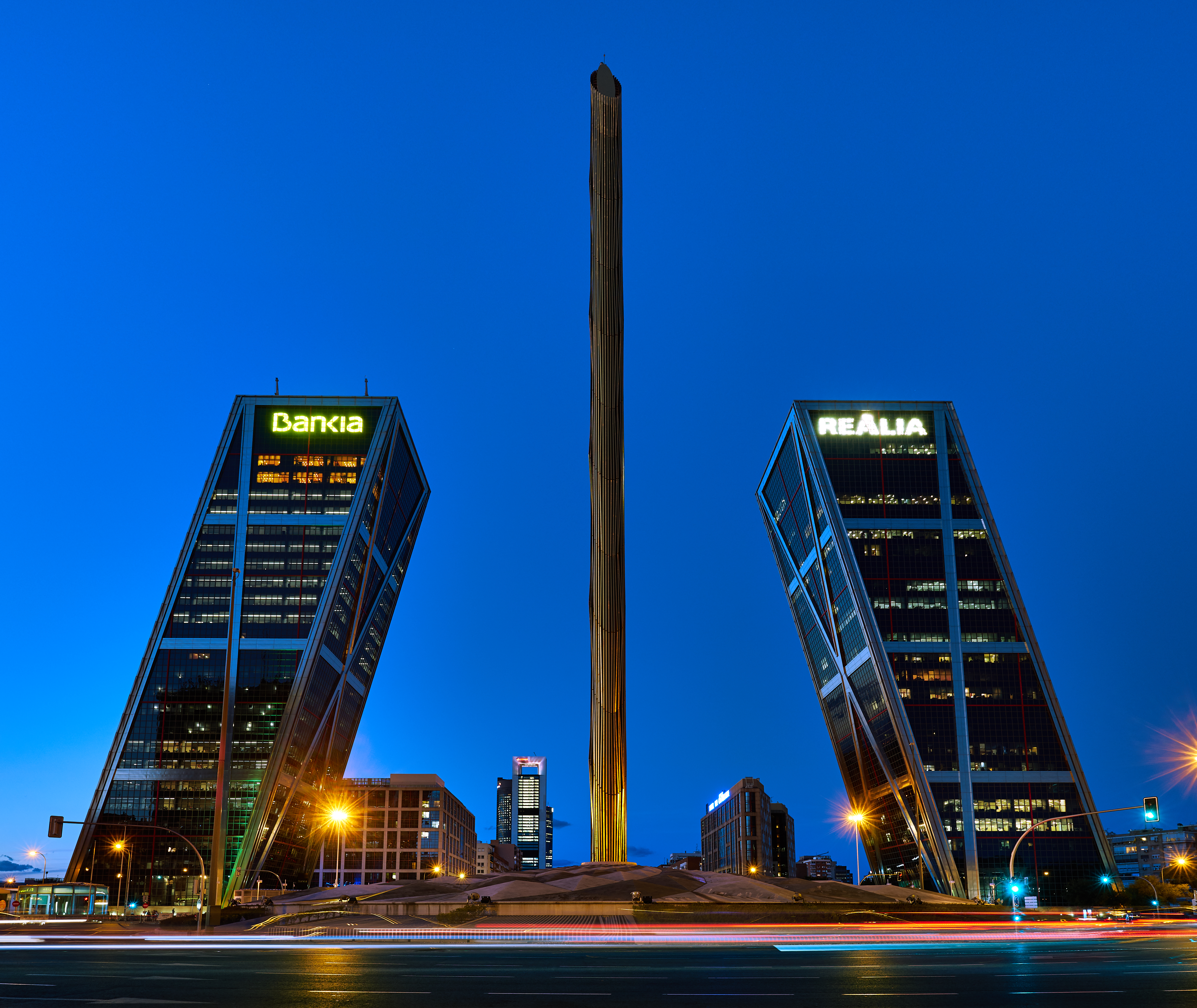 Torres KIO